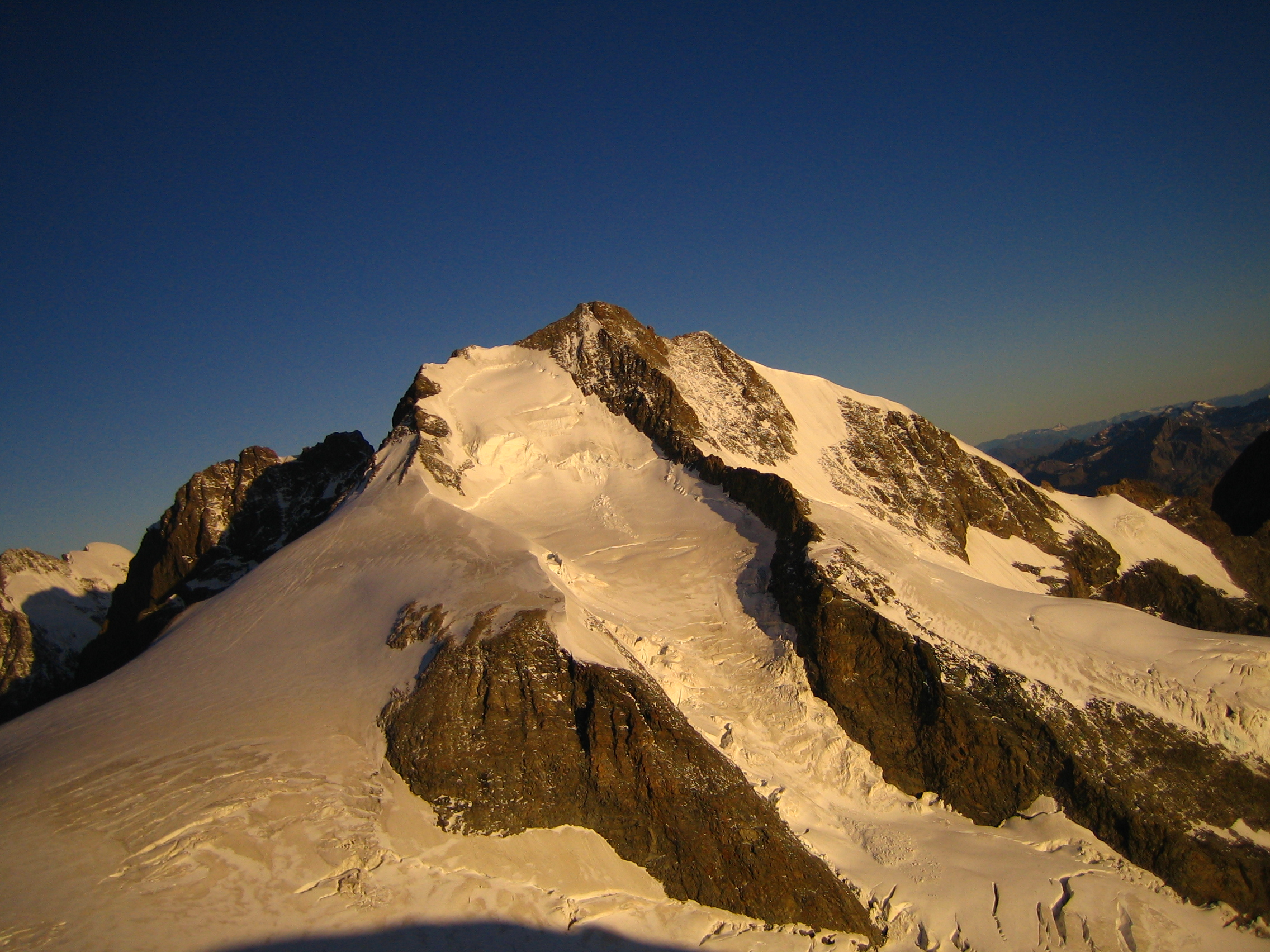 Le piz Bernina depuis la Bellavista terasse (3700m)